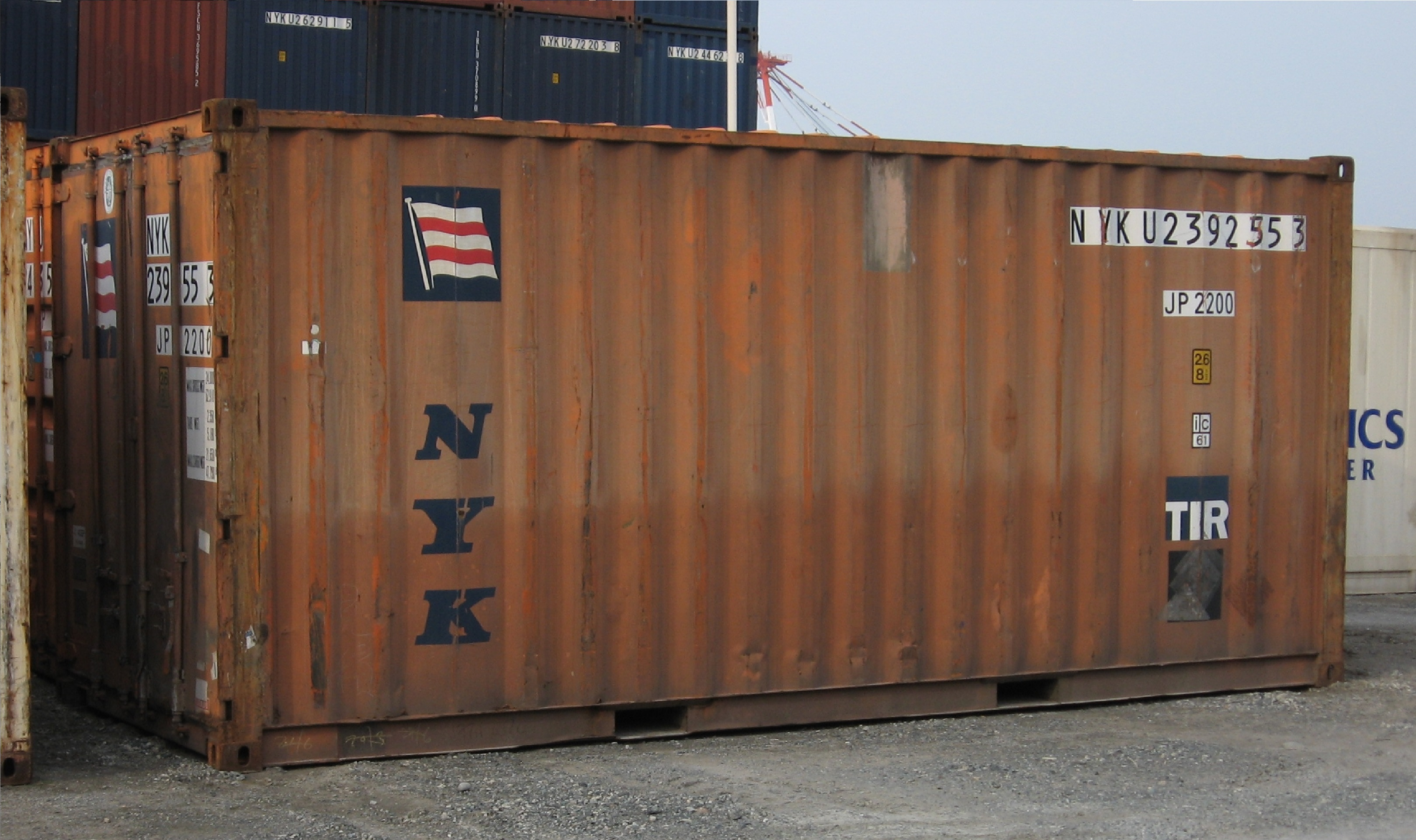 2007,01,23 【福岡／香椎PP】